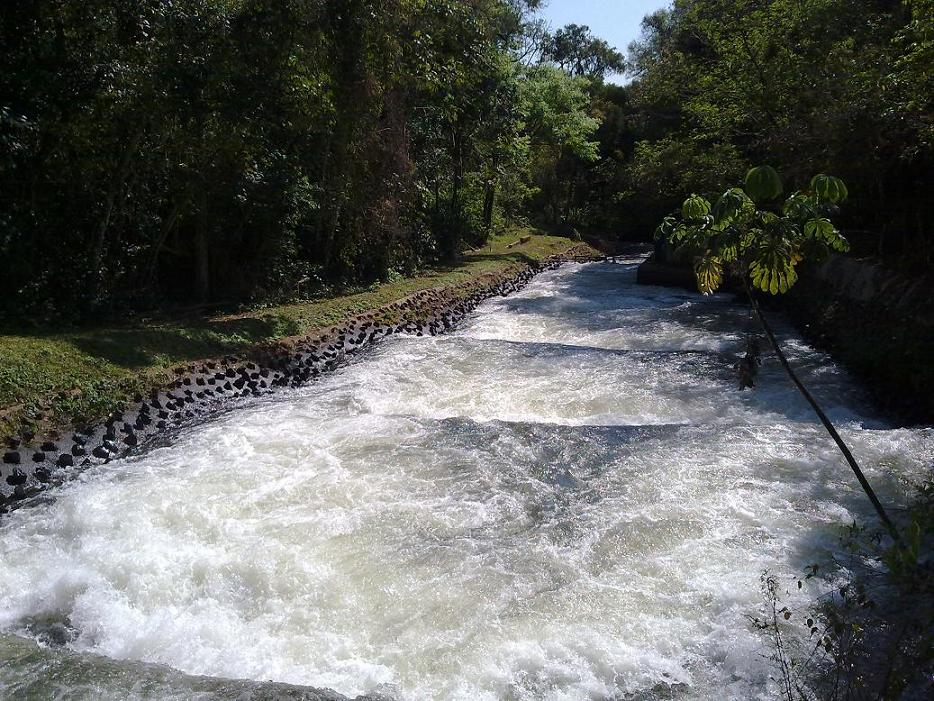 Este es el canal de piracema de la Usina hidroeléctrica Itaipu Binacional. Este canal es usado para la migración y desove de peces